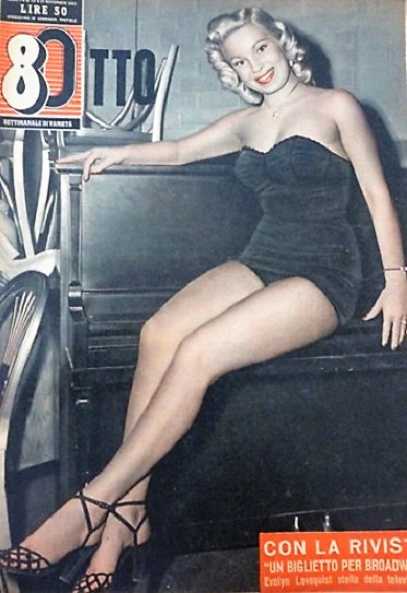 Evelyn Lovewuist